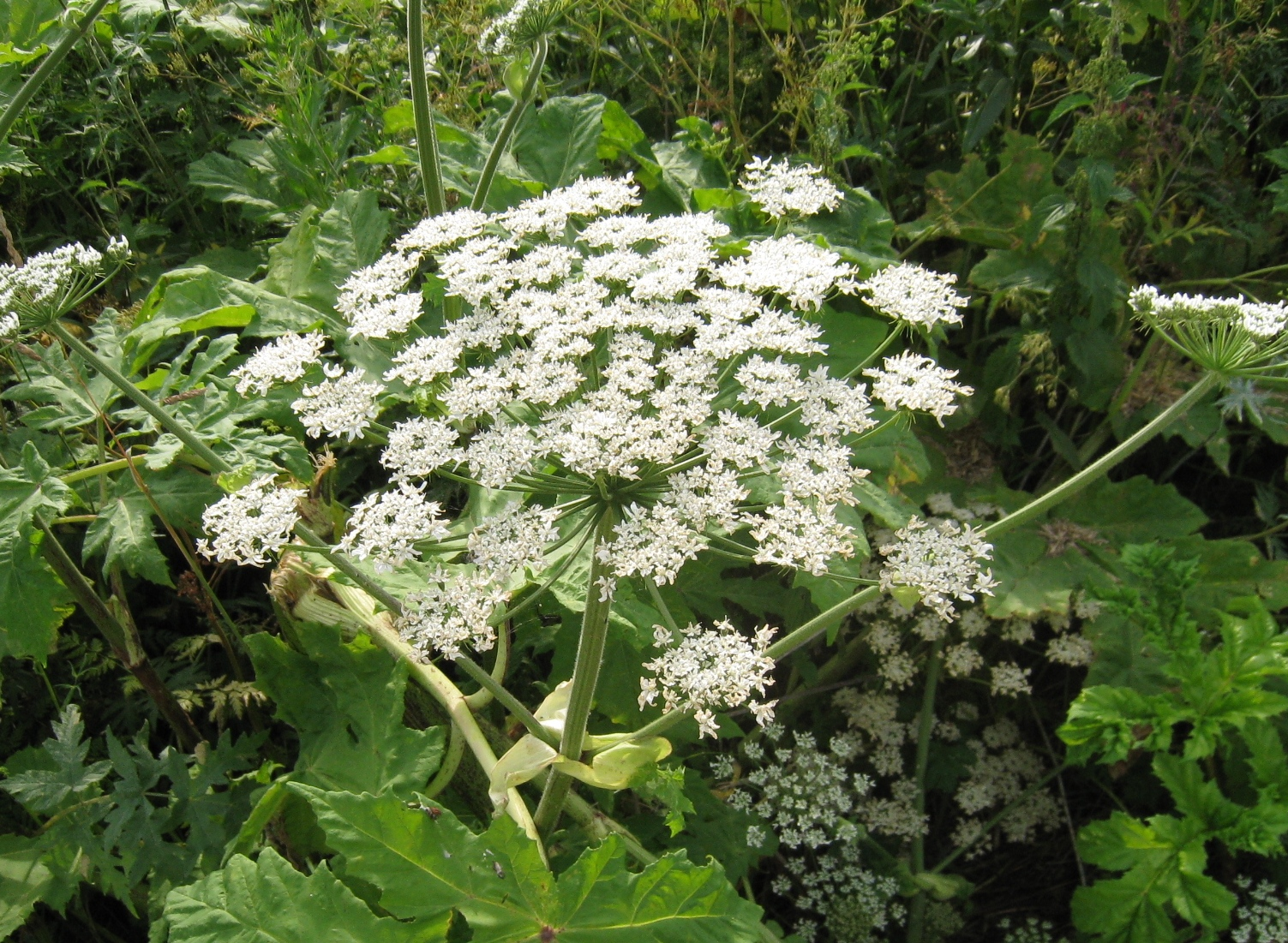 Соцветие борщевика Сосновского Heracleum sosnowskyi в Калужской области РФ